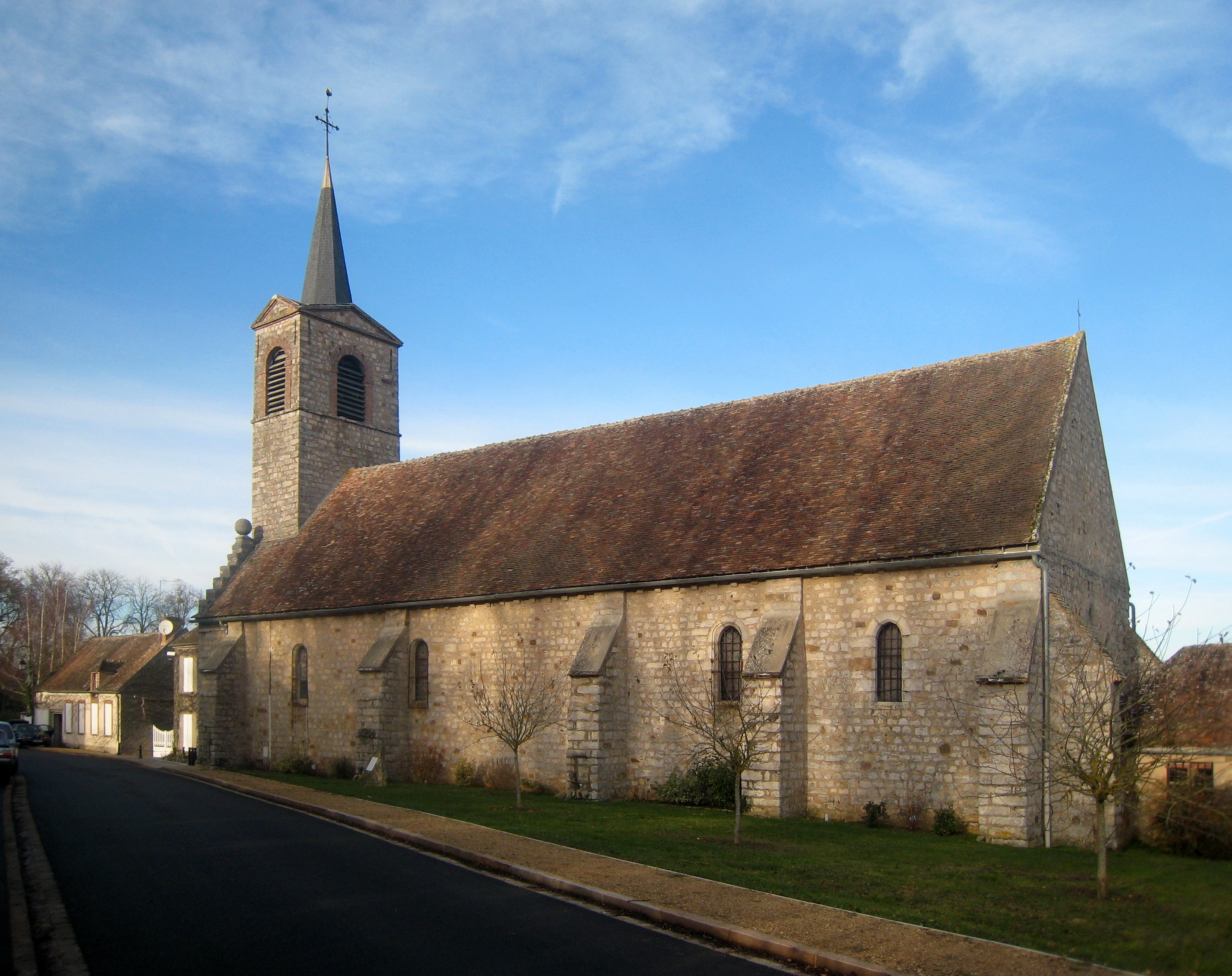 L'église de La Brosse-Montceaux (Seine et marne)